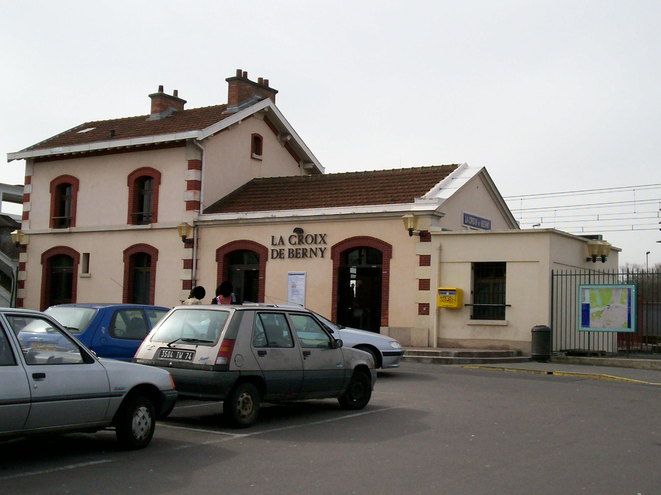 Bâtiment voyageurs de la gare de La Croix de Berny